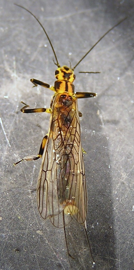 Perlinella drymo, male. IL: Vermilion Co., Middle Fork VermilionR 4/25/2009